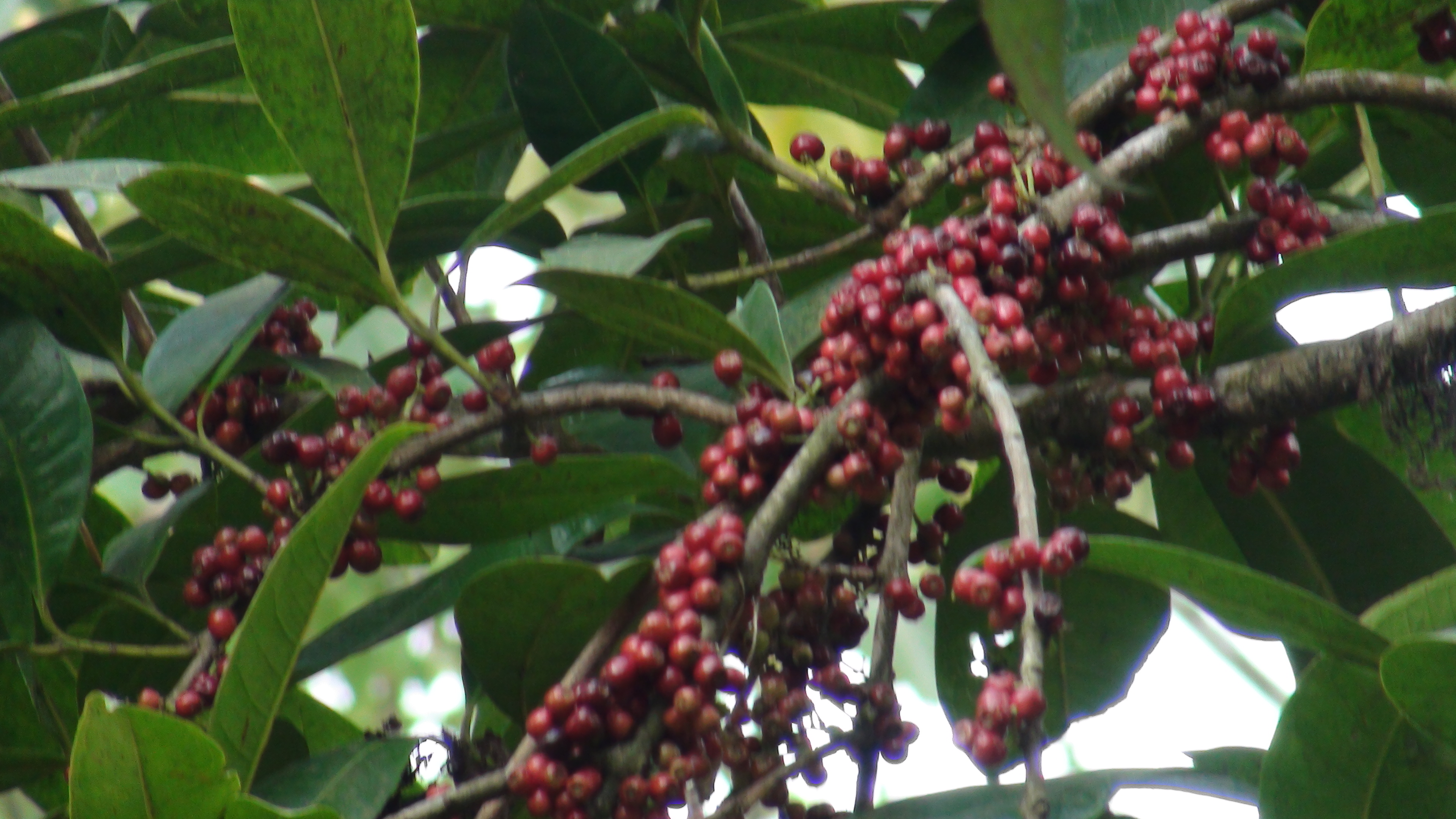 नेपाली: क्यामुनाको फल